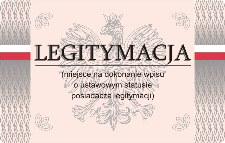 Projekt awersu legitymacji